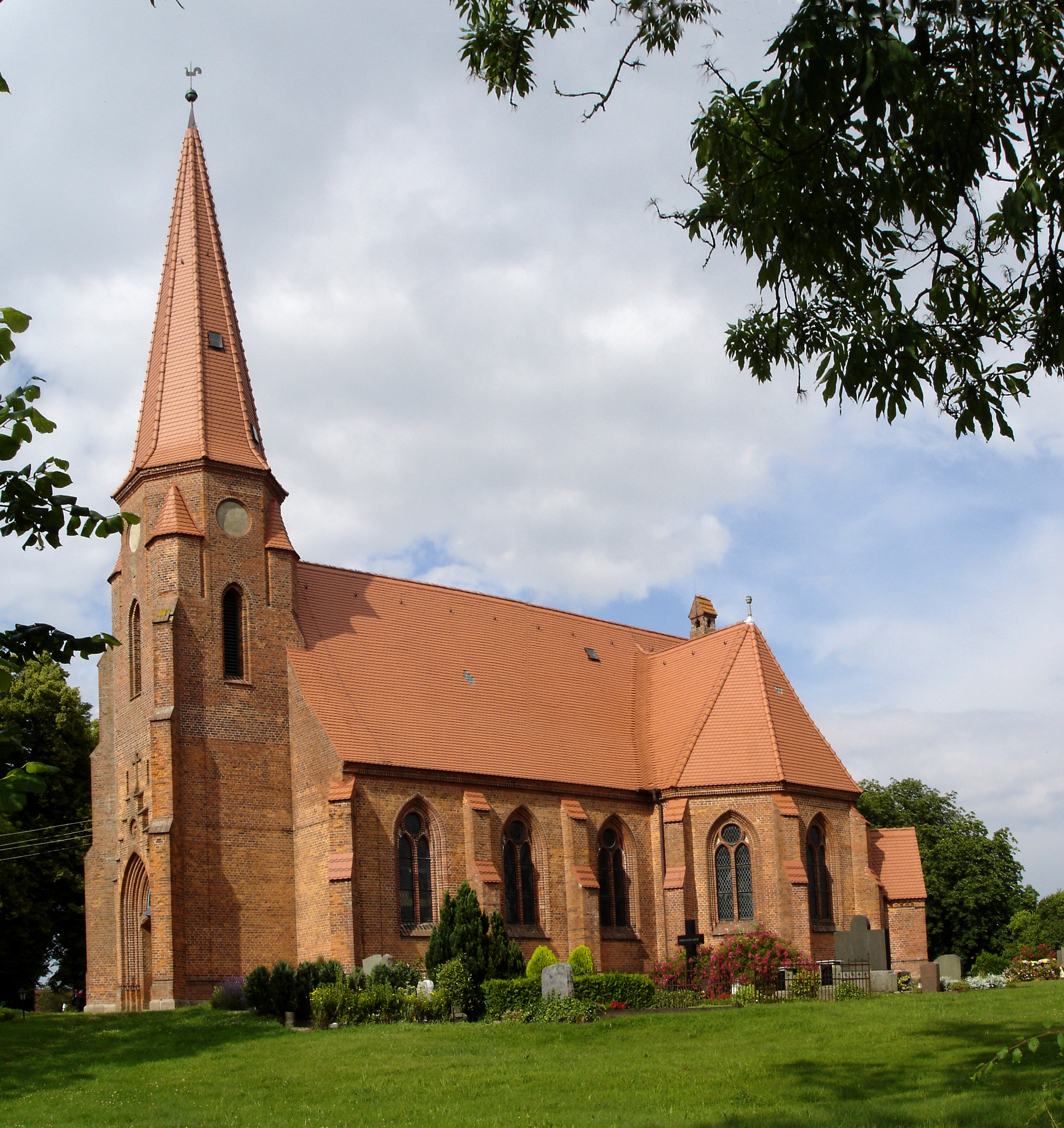 Kirche in Buchholz (Ziesendorf) bei Rostock / Church in Buchholz near Rostock